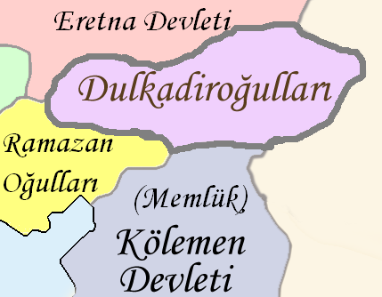 Dulkadiroğulları Beyliği'nin konumu